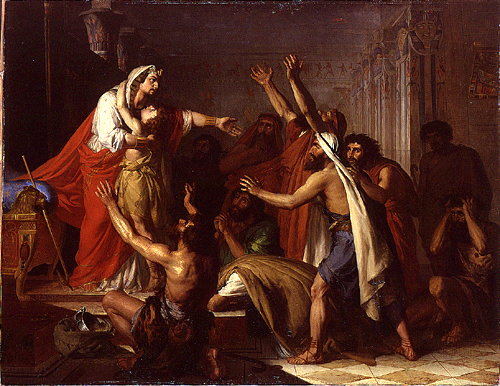 Alphonse Monchablon, Joseph se fait reconnaître par ses frères, 1863, Paris, Ecole Nationale Supérieure des Beaux-Arts